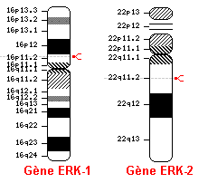 Idéogrammes des gènes de ERK-1 et ERK-2